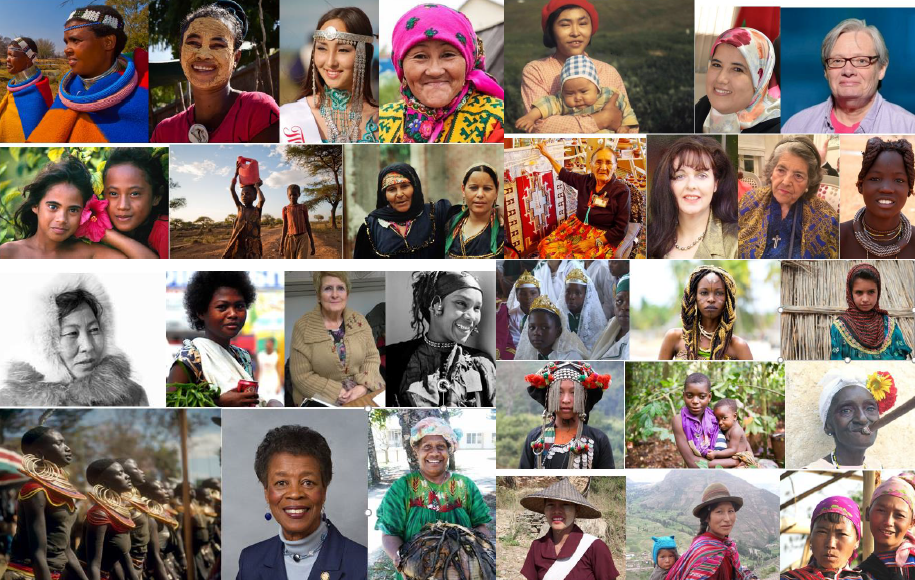 Hainbat talde etnikotako pertsonak